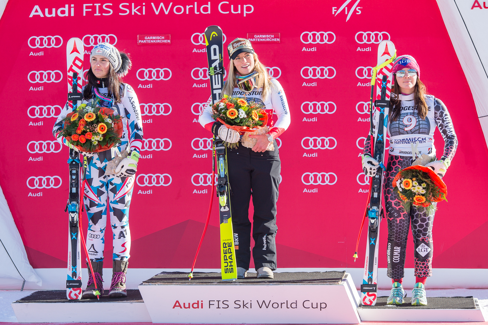 64. Kandahar Rennen,Audi FIS Ski Weltcup Garmisch-Partenkirchen,Damen Super-G,Flower Ceremony,Kandahar,Ladies Super-G,Lara Gut,Stephanie Venier,Tina Weirather